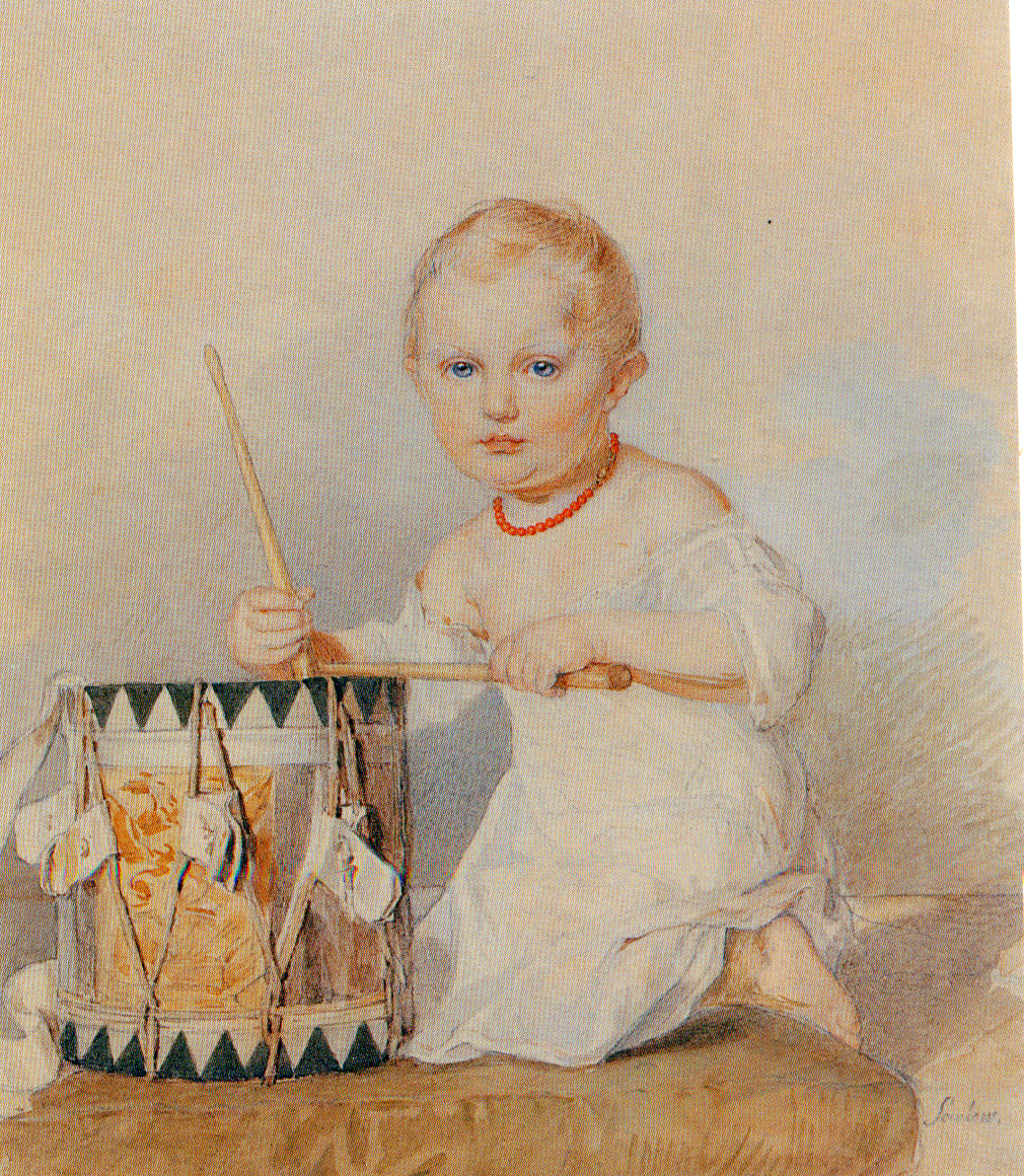 Портрет великого князя Константина Николаевича в детстве